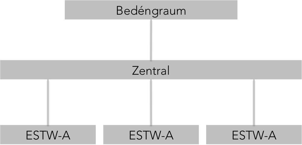 Prinzip wéi en elektronescht Stellwierk opgebaut ass.